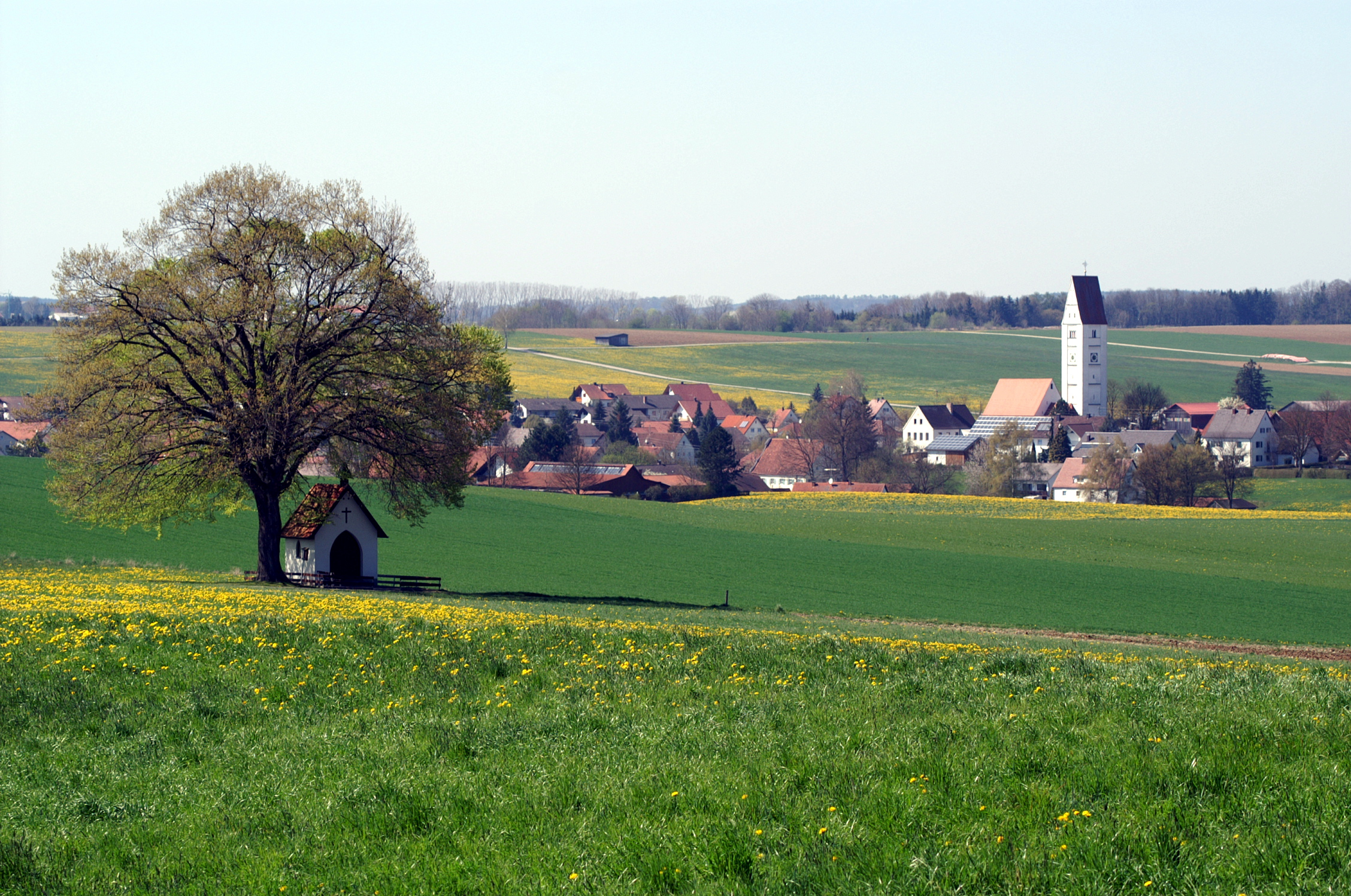 Eppishausen von Osten